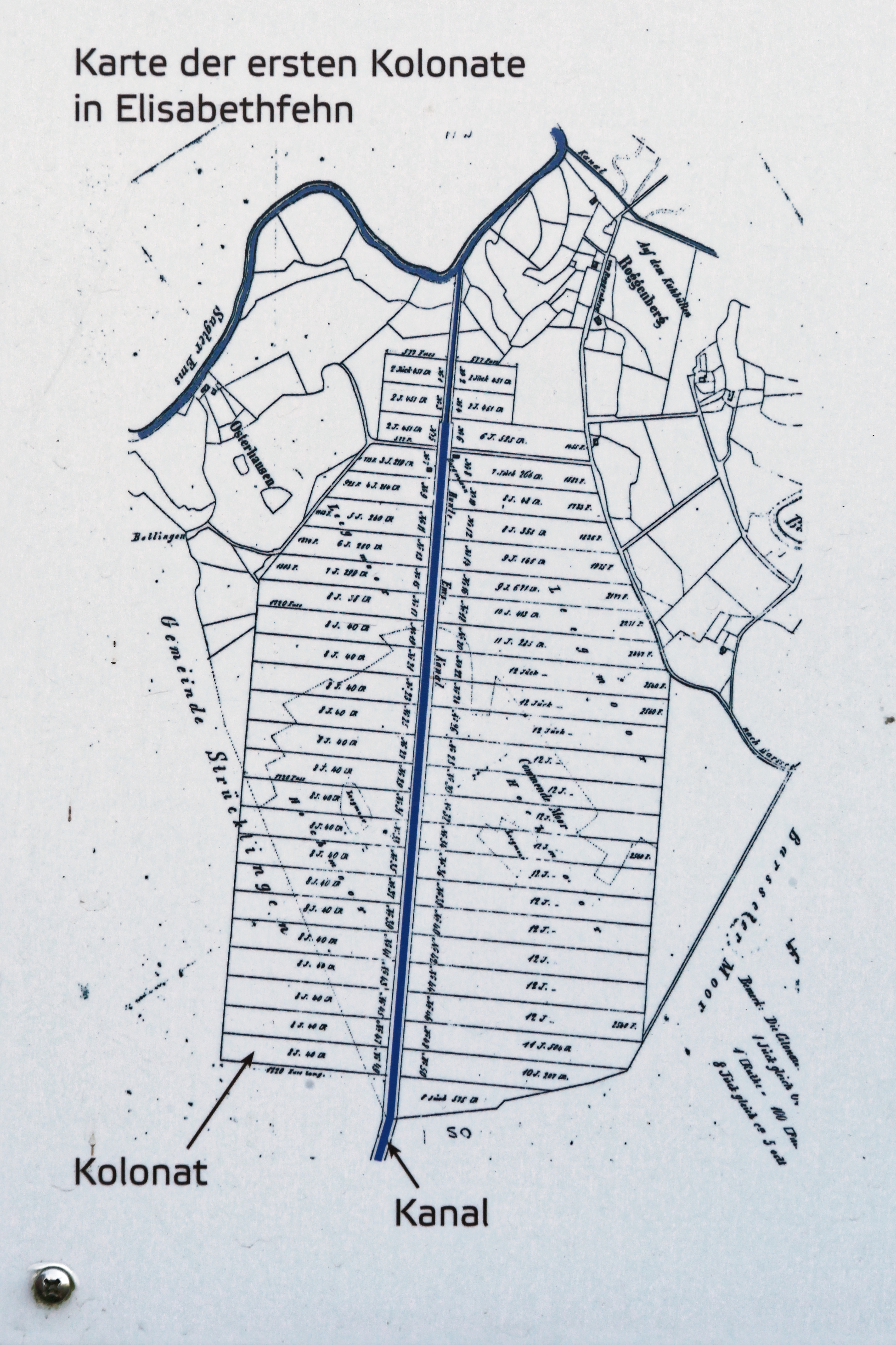 Moor- und Fehnmuseum Elisabethfehn in Barßel